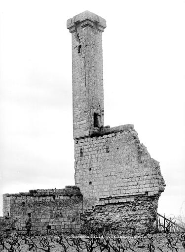 Vue d'ensemble de la tour dite la Lanterne, à Rochecorbon, par Séraphin-Médéric Mieusement, septembre 1888.